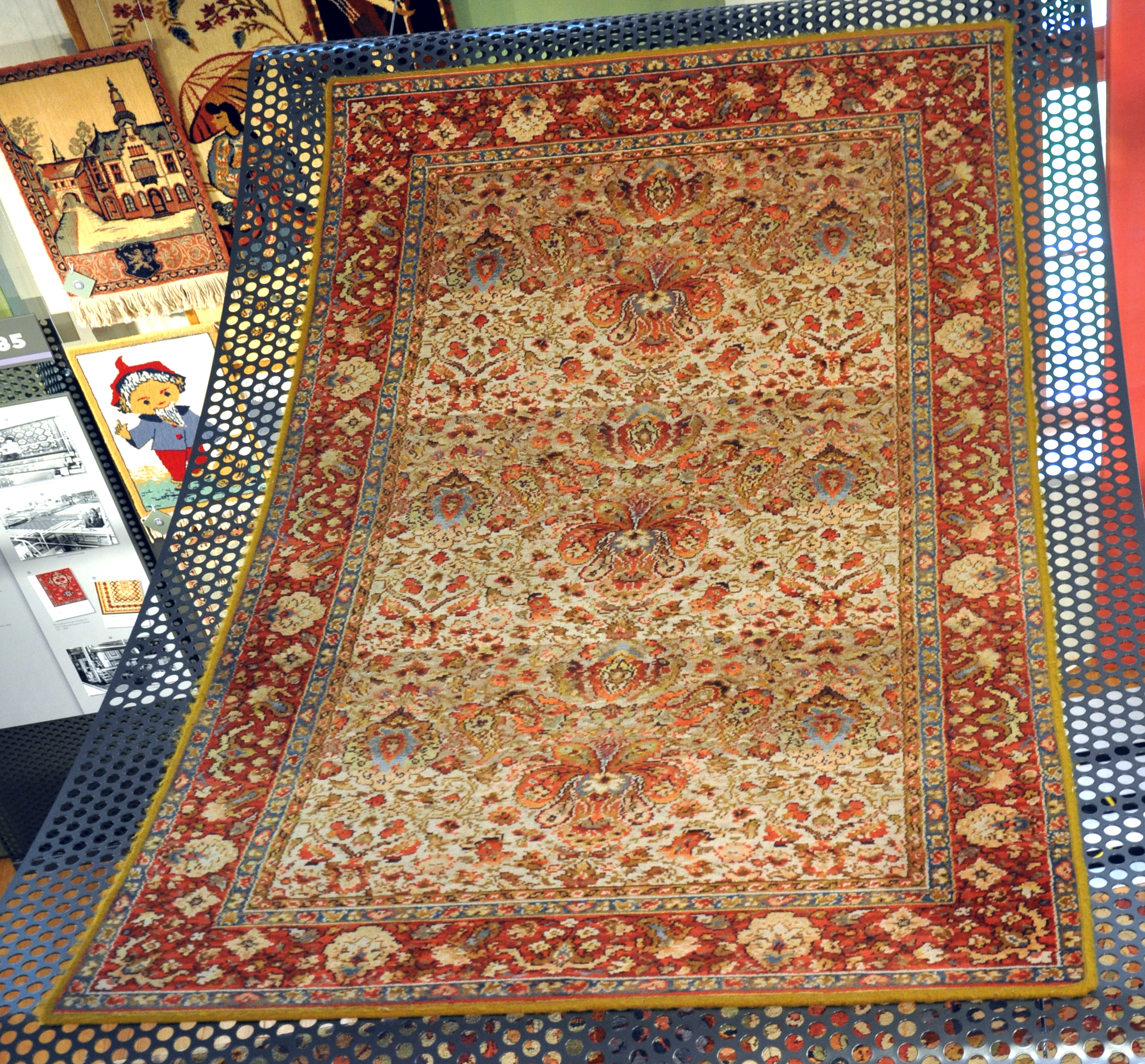 Oelsnitz/Vogtland, Teppich-Museum Schloss Voigtsberg Brücke, Tefzet AG, 1939/1940, Technik: Chenille-Axminster, Genre/Stil: persisch-Schattierung, Qualität: Tefzet-Persian; Dessin: 9512, Material: Wolle, Dichte: 32 Strang auf 10 cm